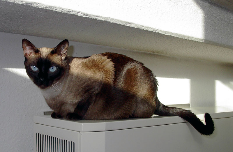 Seal-Point Thaikatze (Eigenes Foto, GNU-FDL)